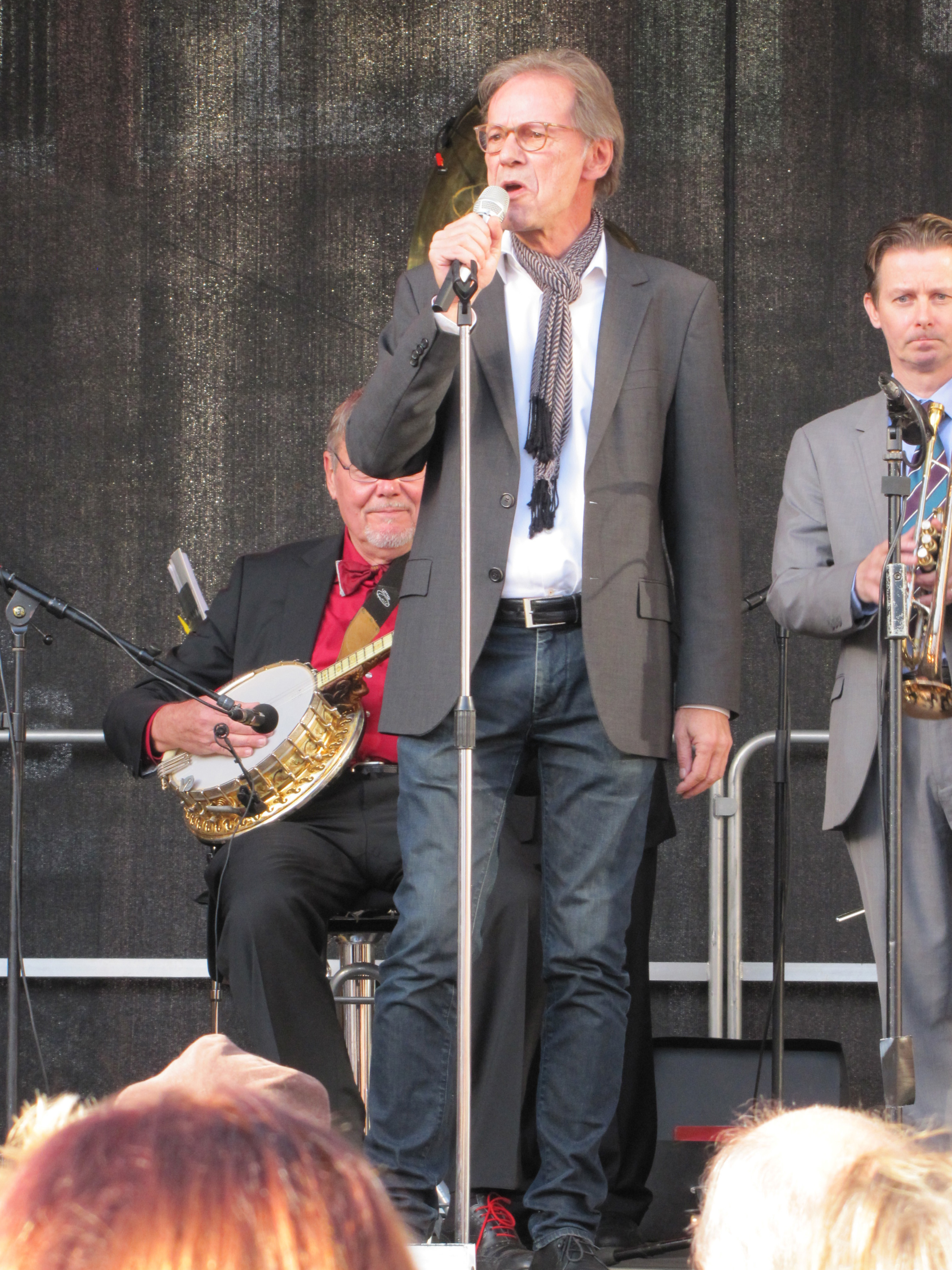 Dieter Bartetzko mit den "Red Hot Hottentots", bei "Jazz zum Dritten" 2013, auf dem Römerberg in Frankfurt am Main.